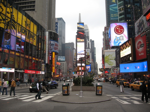 Time Square, NYC